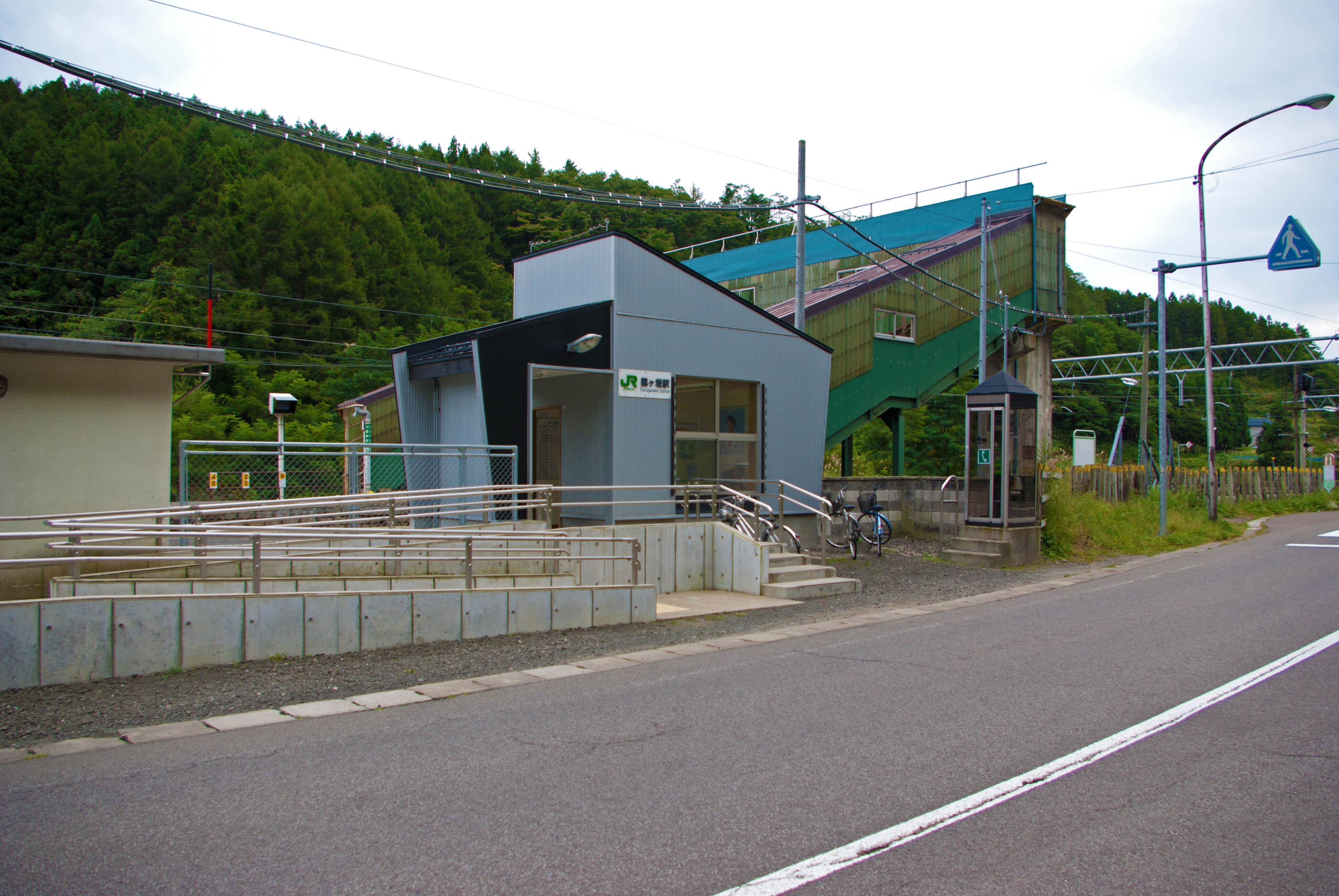 東日本旅客鉄道奥羽本線鶴ヶ坂駅